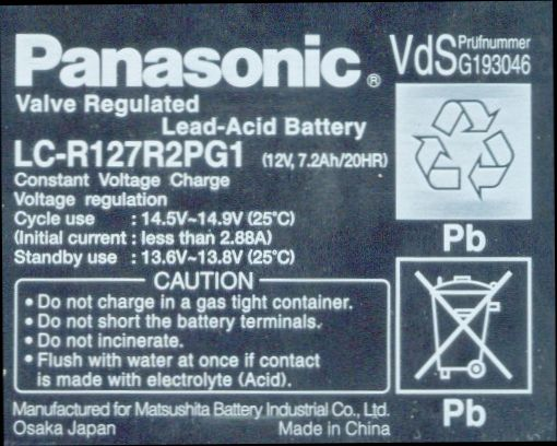 Beschriftung eines Akkus für eine Notstromversorgung mit VdS-Pruefnummer